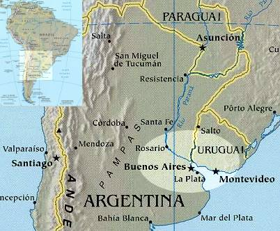 El castellà riuplatenc es basa principalment al sud de l'Uruguai i a la zona capital de l'Argentina.